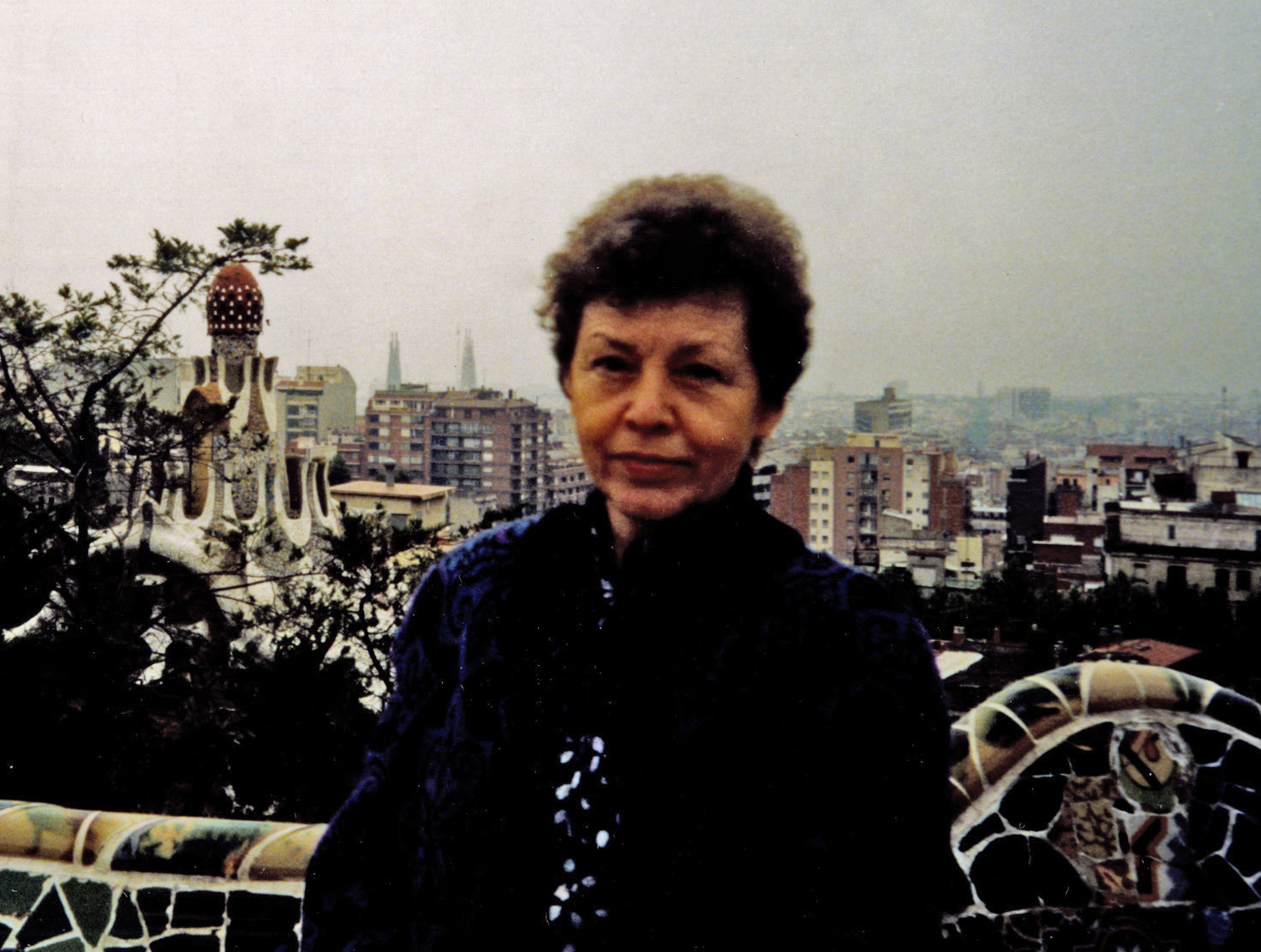 Фотопортрет архітектора Тамари Олексіївни Целіковської